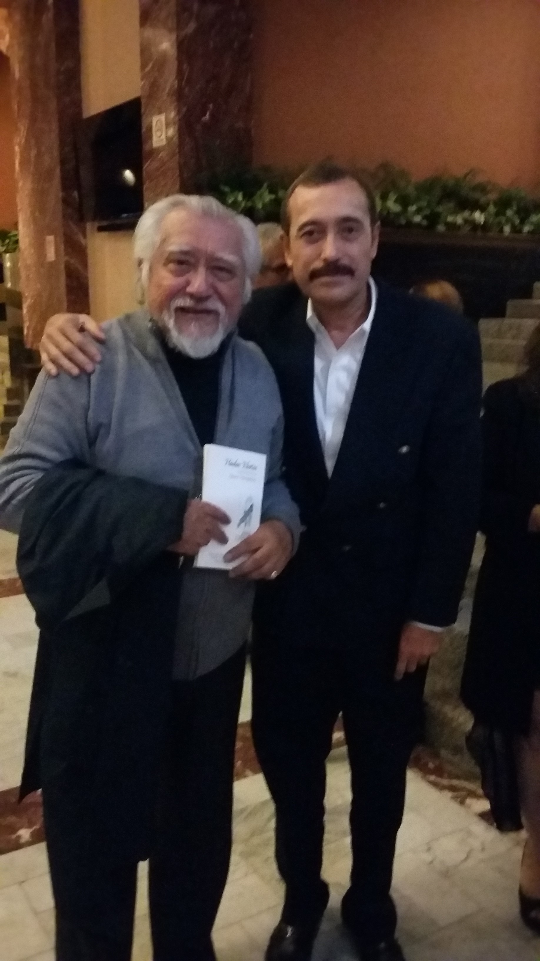 Fotografía tomada en la presentación de la antología donde participó José González Gálvez: "Vamos al Circo". n el Palacio de Bellas Artes.